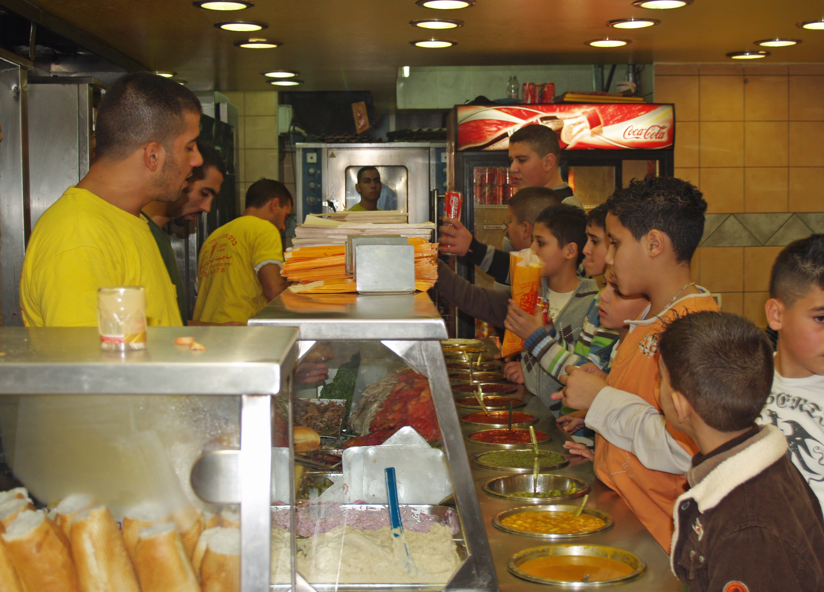 Falafel restaurant in Nazareth